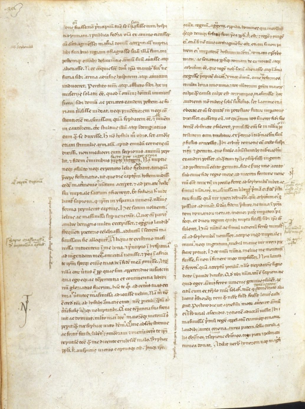 Livius, Ab urbe condita, Handschrift des 13. Jahrhunderts. London, British Library, Harl. 2493, fol. 213v.